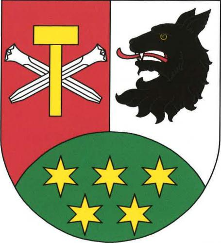 znak, Kamenná Lhota, okres Havlíčkův Brod